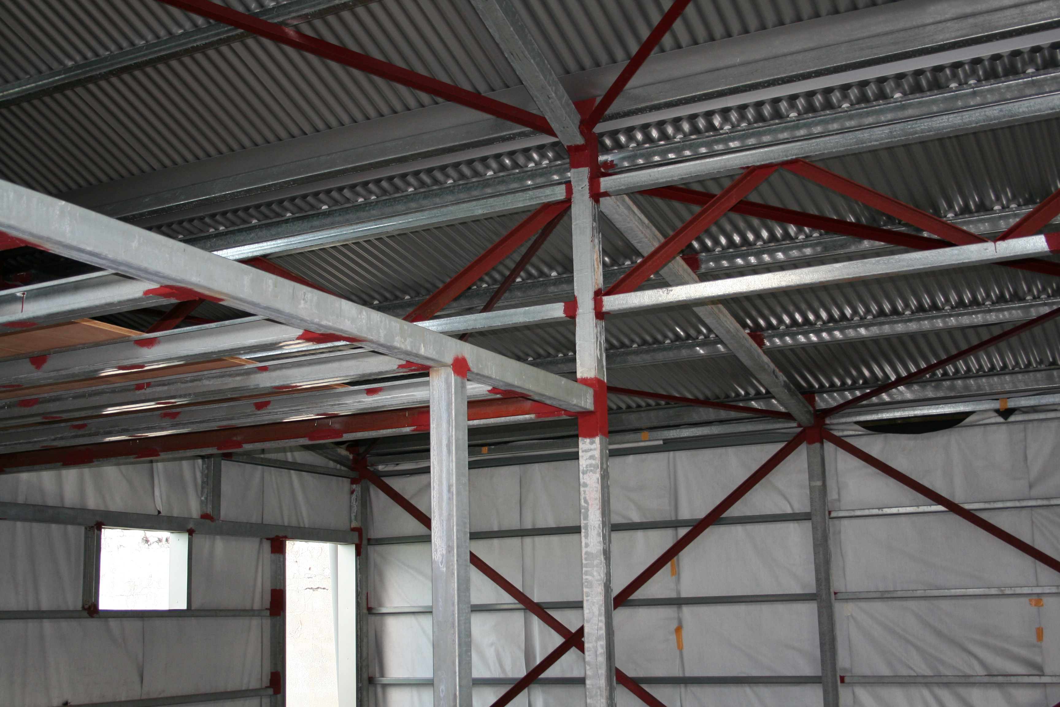 L'intérieur d'une maison dont la superstructure est métallique, à La Réunion.